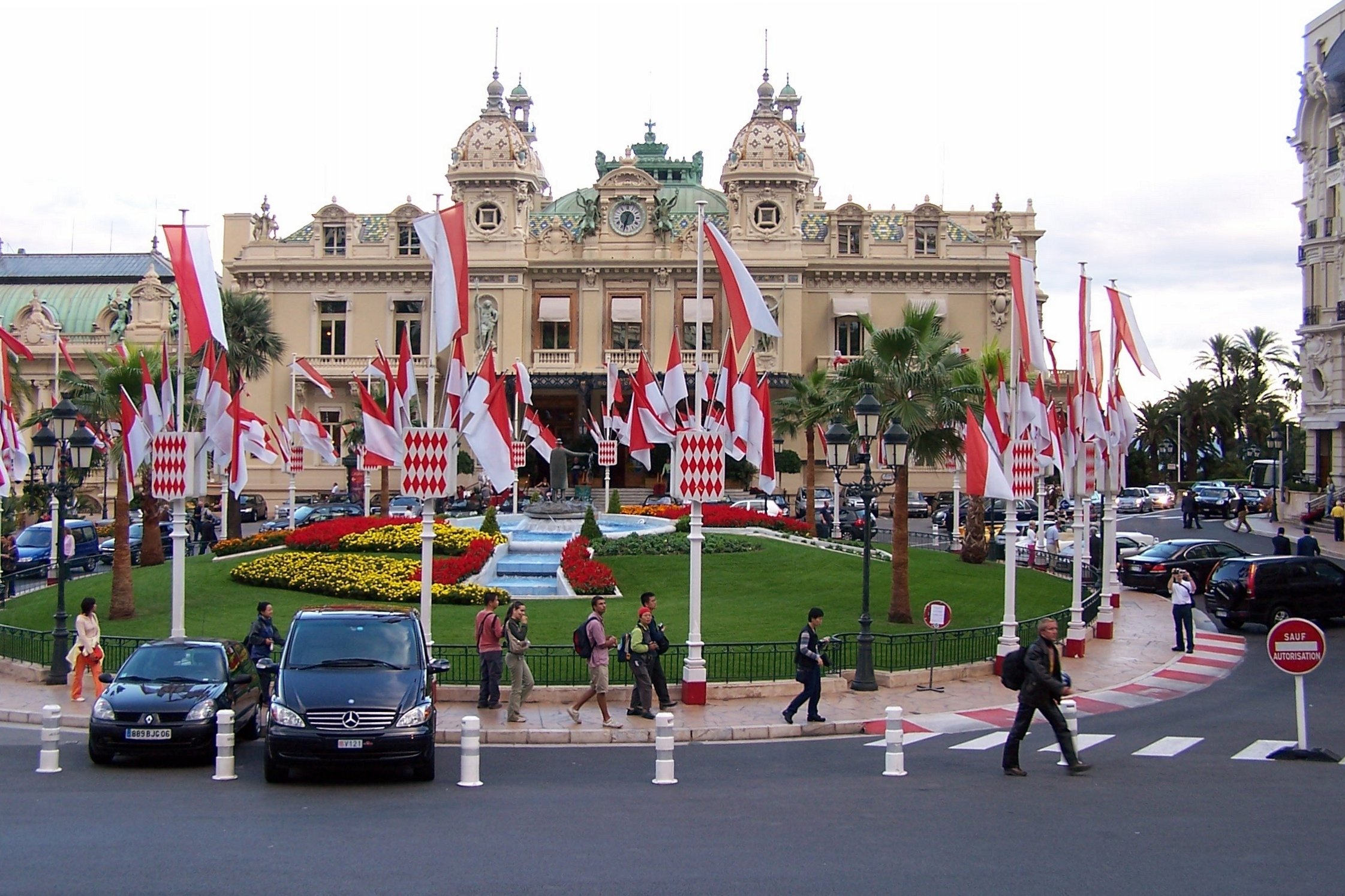 Casino of Monte-Carlo, Monaco